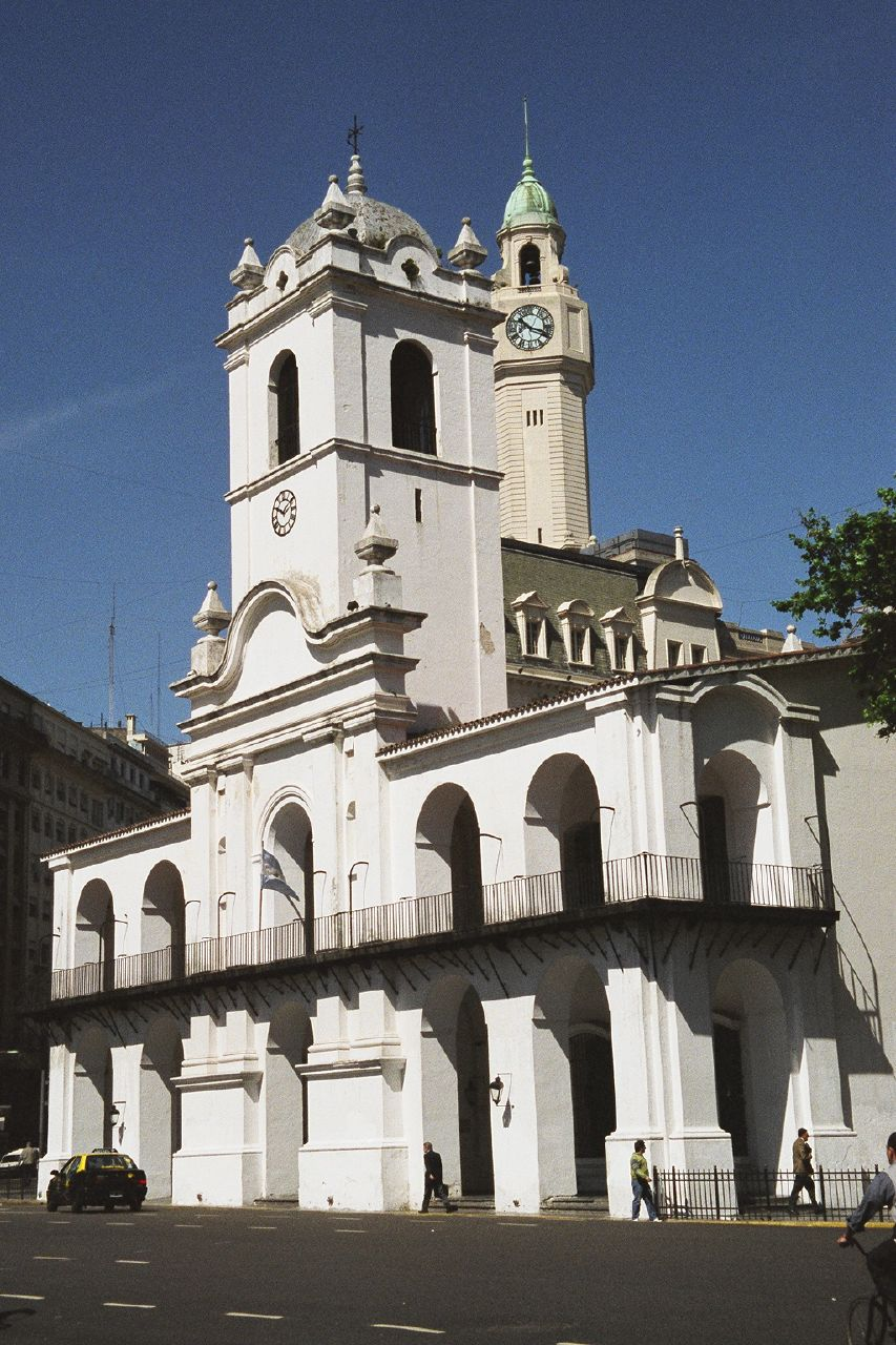 Cabildo de Buenos Aires en julio de 2005